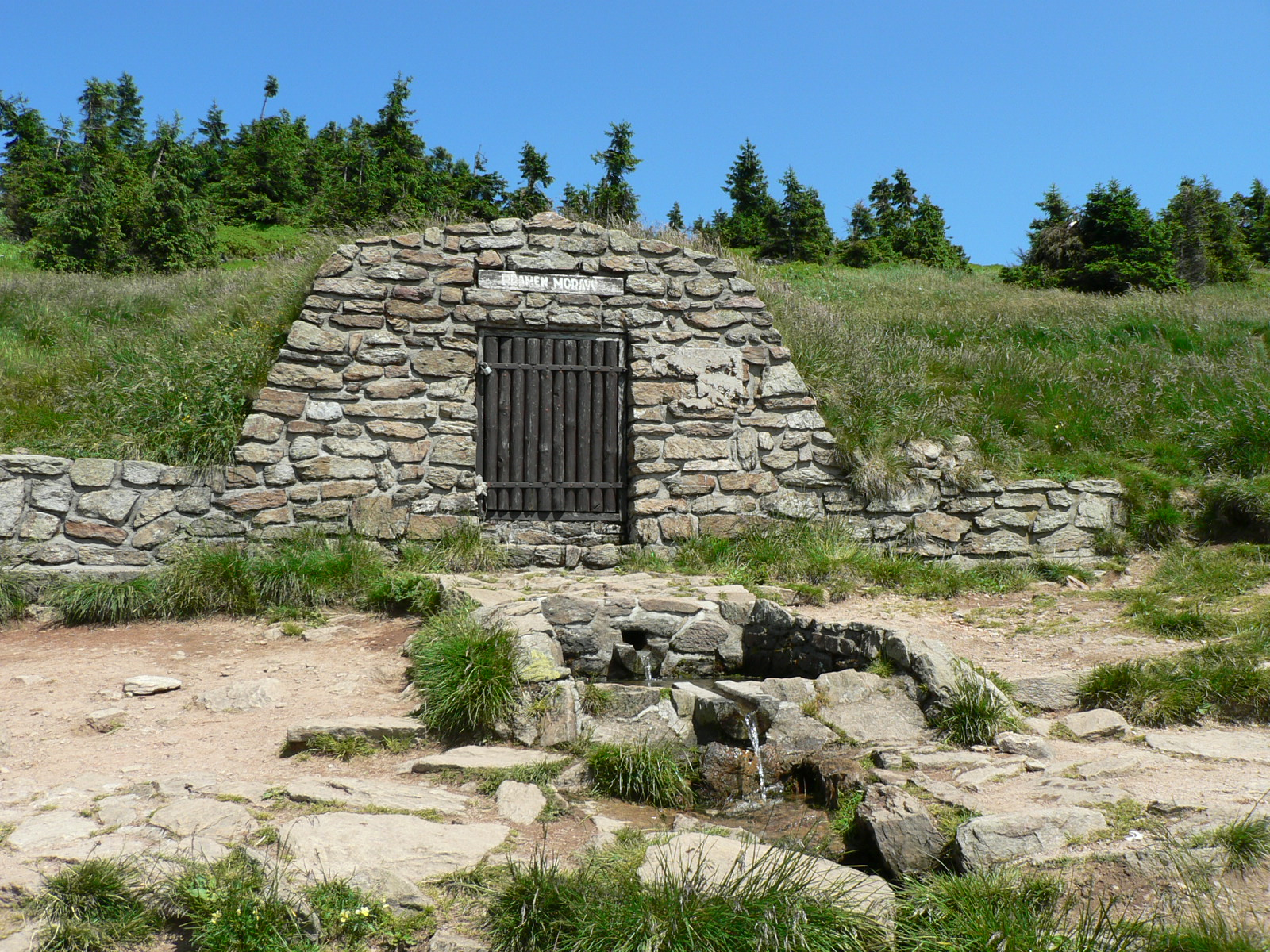 Prameny řeky Moravy